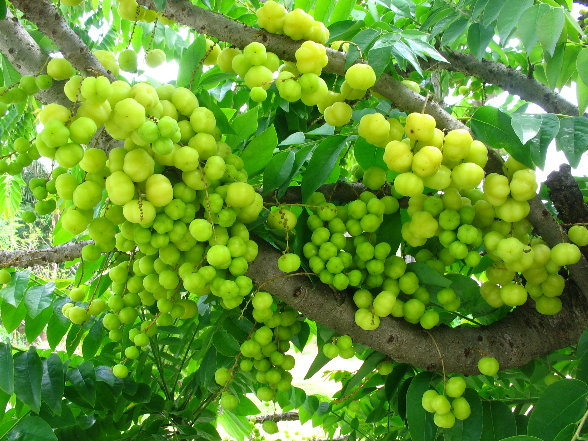 അരിനെല്ലിക്ക,പുളിനെല്ലിക്ക തുടങ്ങി പല പേരുകളൂണ്ട്